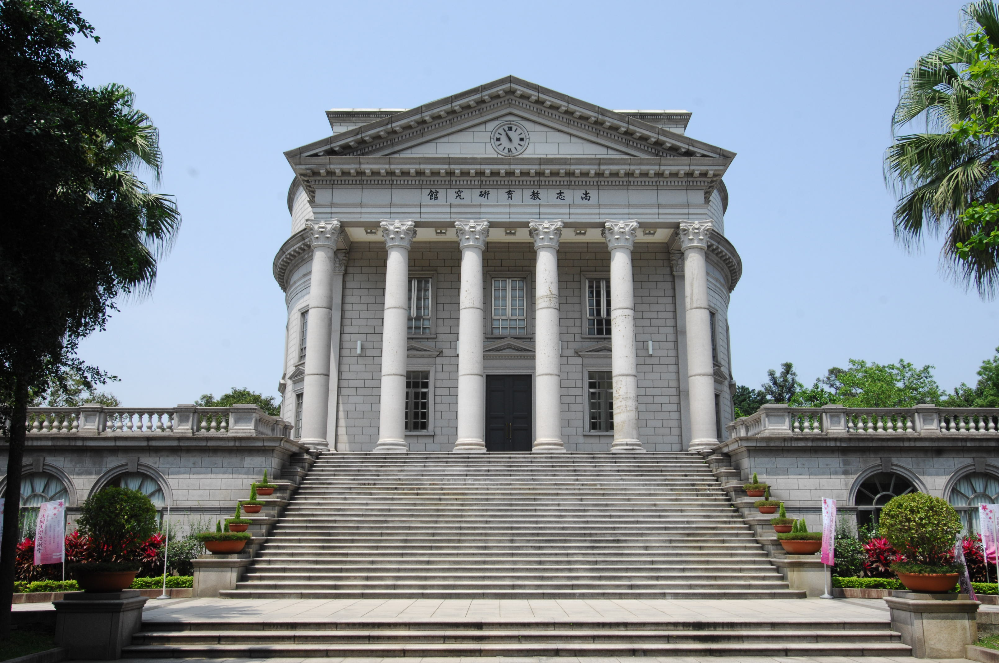 中文（台灣）: 大同大學尚志教育研究館正面外觀。